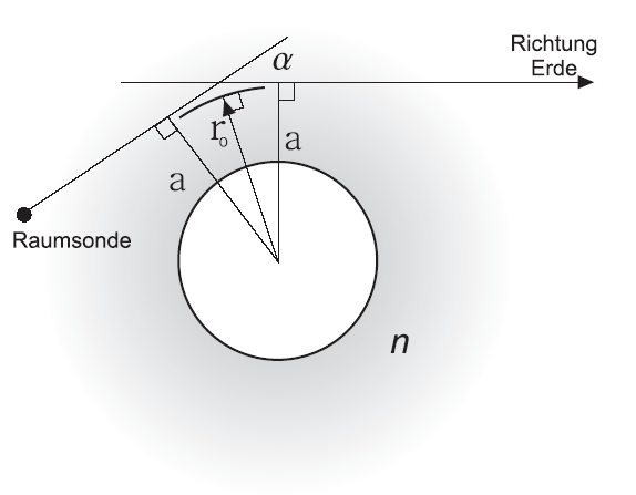 Geometrie des Radio-Okkultationsexperiments